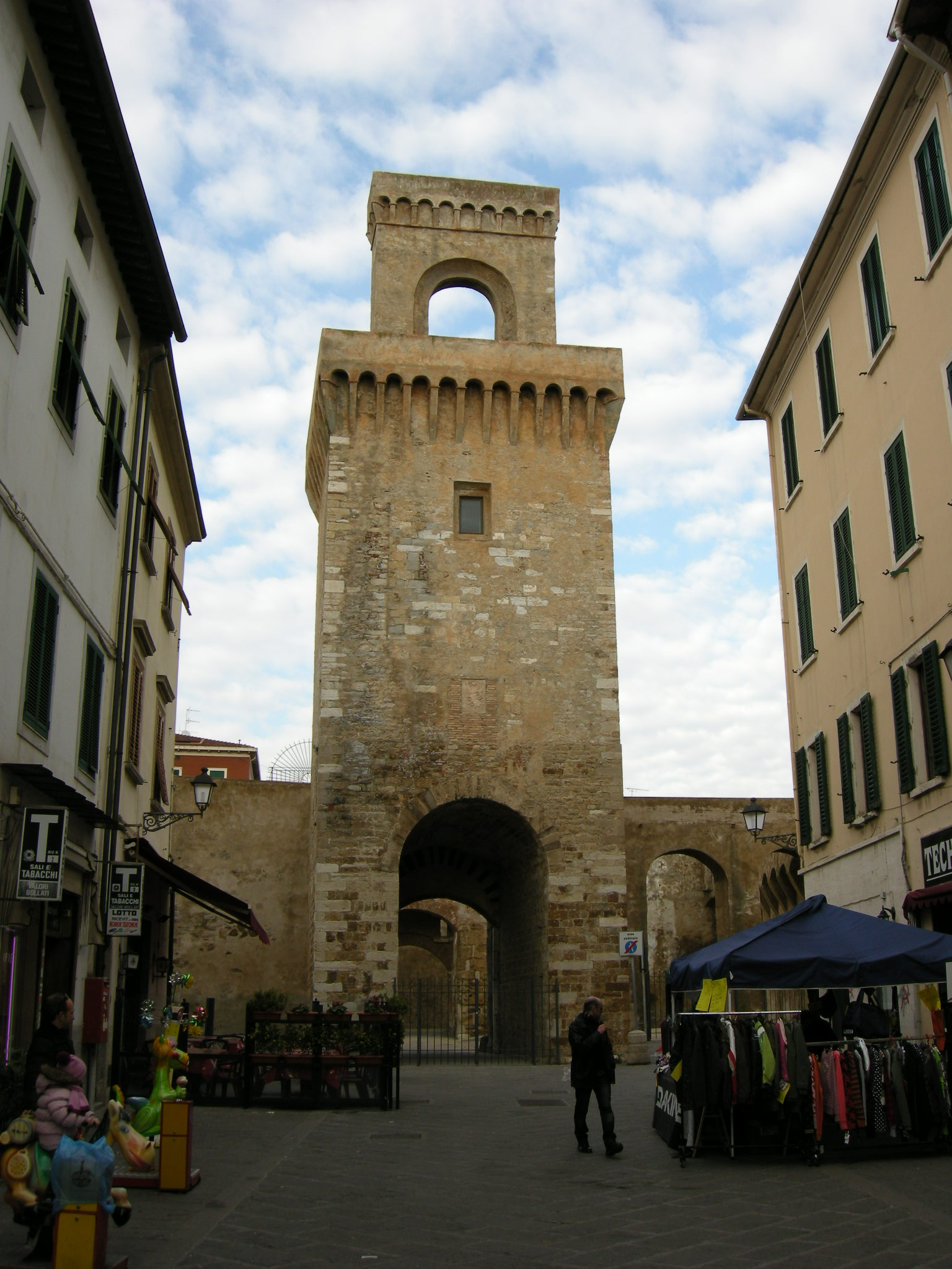 Torrione e Rivellino